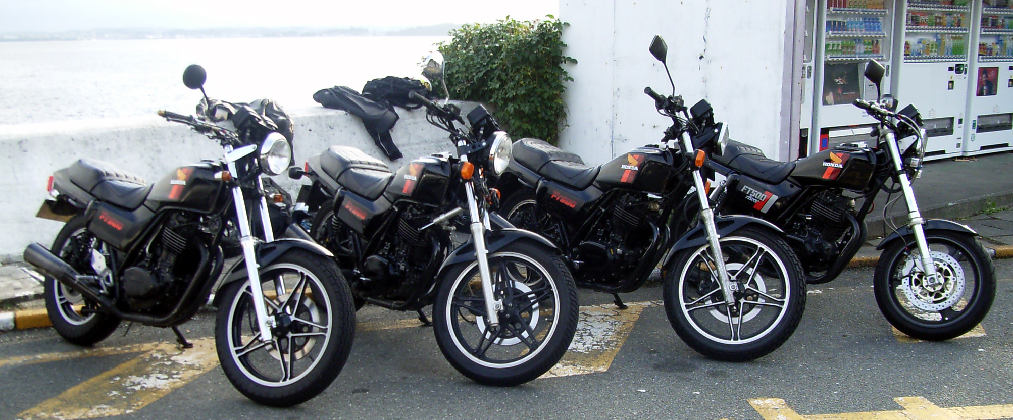 HONDA FT500 向かって右から2台目がもっともオリジナルに近い。他の3台は外装が変更されている。2005年10月16日 投稿者撮影